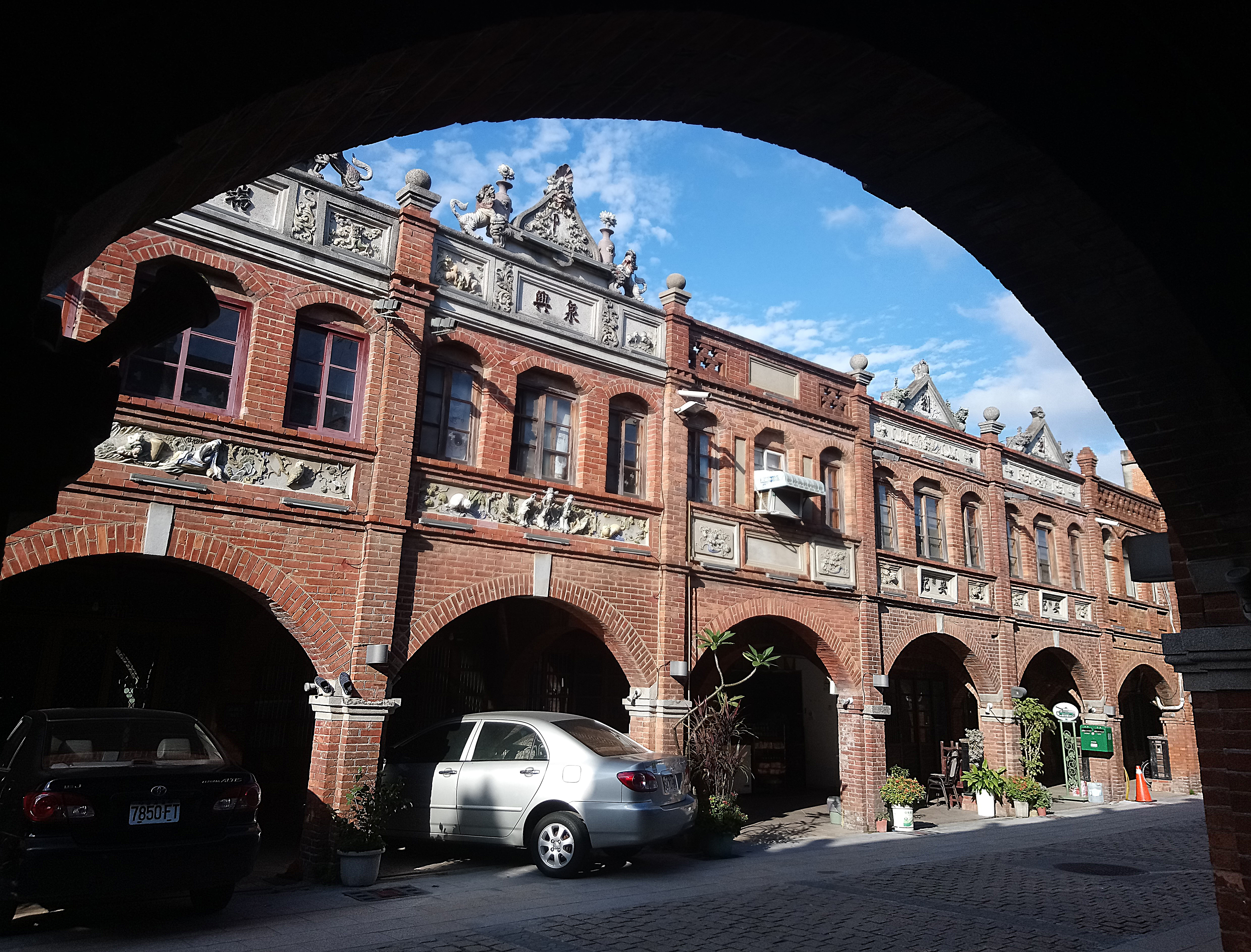 拱圈內的湖口老街豐瑞（左一）與興泉（左二）,新竹縣湖口鄉湖鏡村